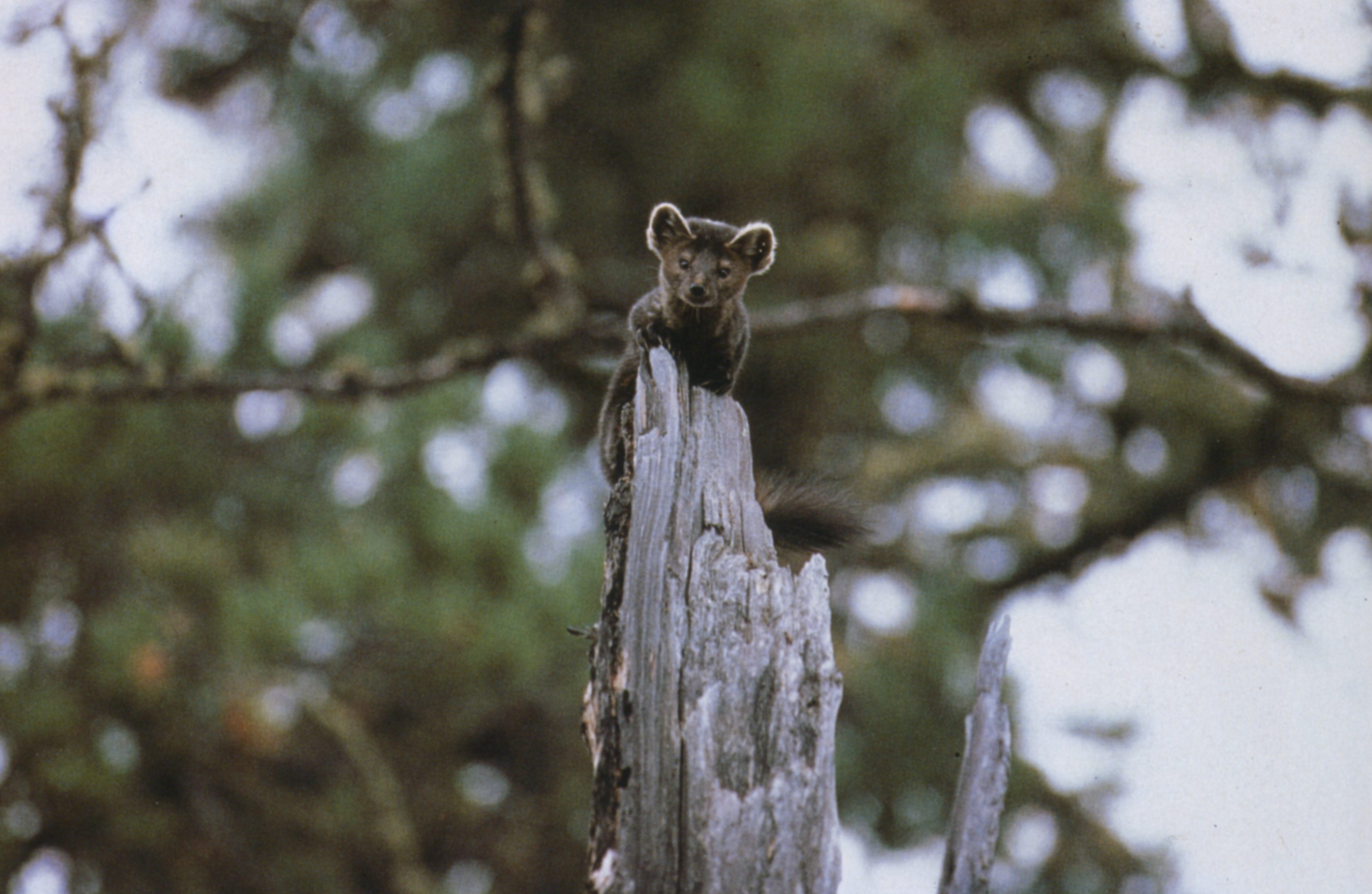 Zibellino del Barguzin